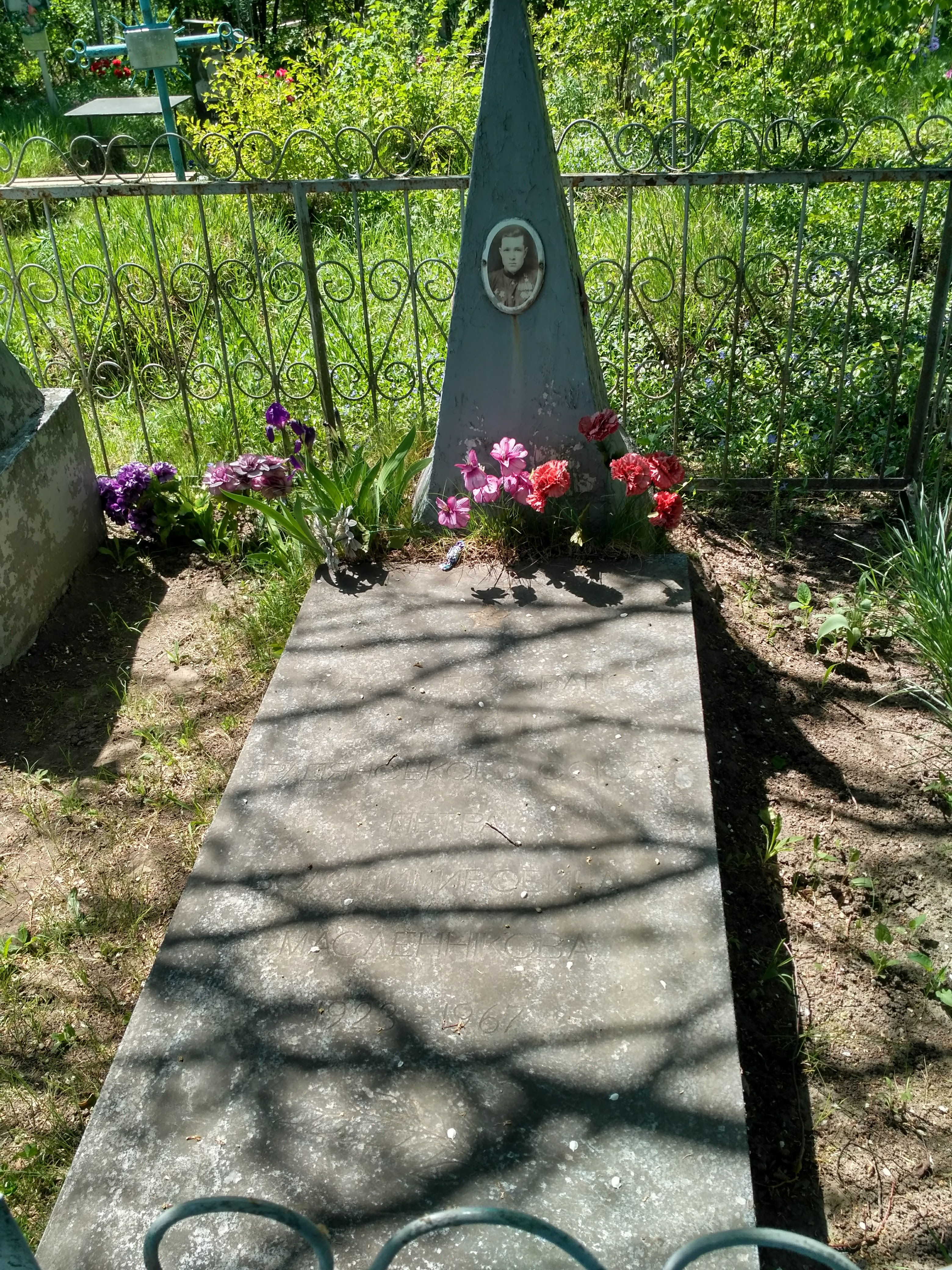 Могила Героя Радянського Союзу П.В. Маслєннікова на сільському цвинтарі в Чорнухах. Травень 2017 року.